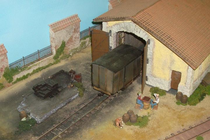 Ausschnitt der Modulanlage Saint-Paul in der Spur 0e an der Spiel und Hobby Messe Suisse Toy (Schweiz) im Herbst 2009. Der Güterwagen stammt von Fleischmann (Magic Train) und ist verkürzt. Die Geleise stammen von Peco.